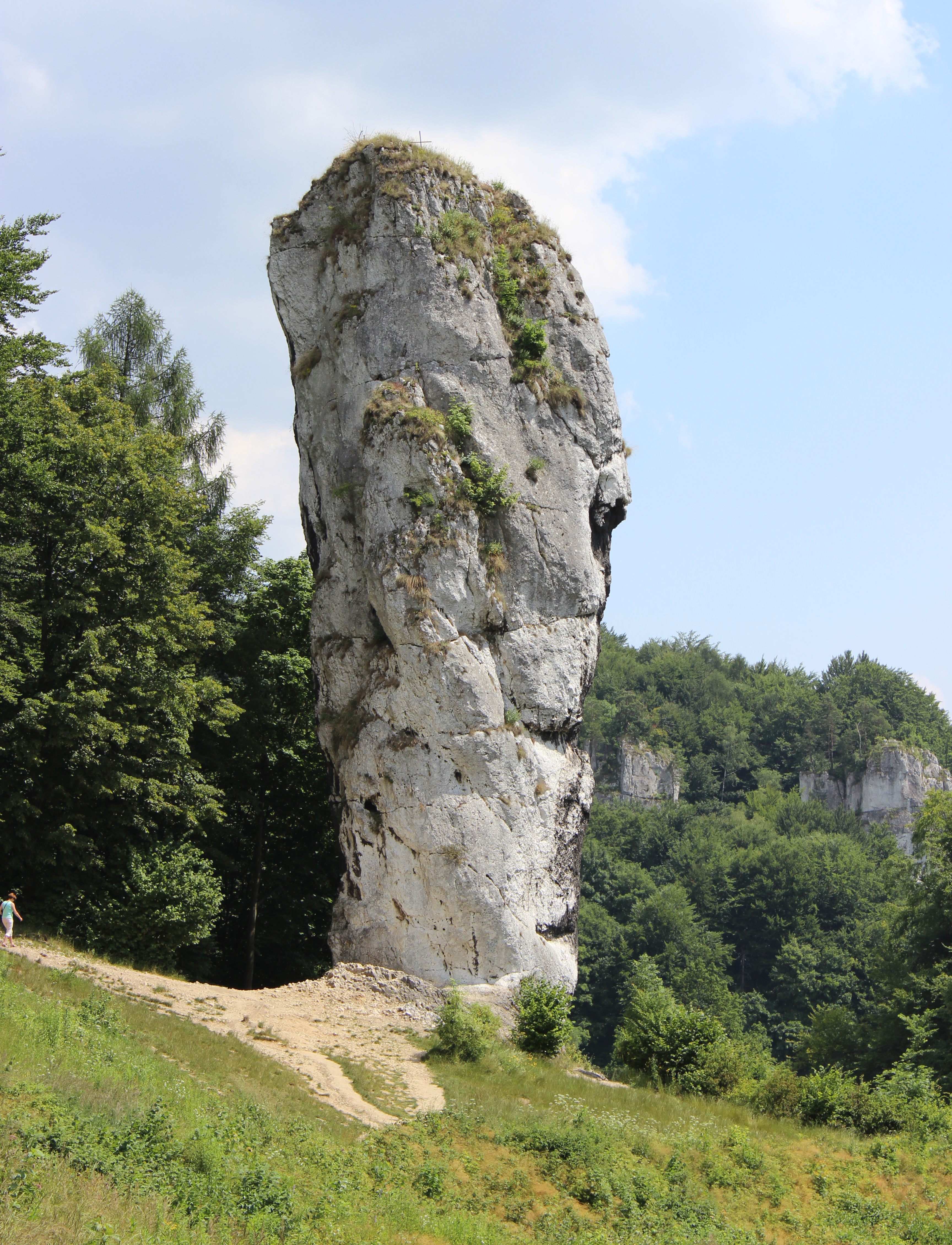 Widok na Maczugę Herkulesa ze ścieżki pod zamkiem z Pieskowej Skały